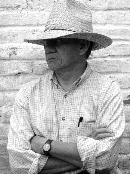 Alejandro Honda Alejandro Honda, 2005. Fotografía de Erick Rams.